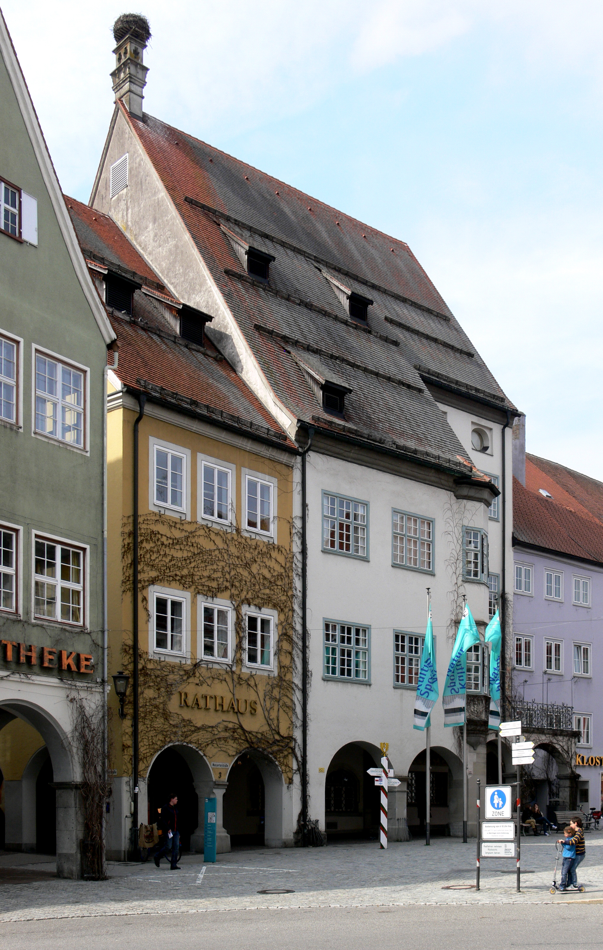 Isny im Allgäu, Rathaus